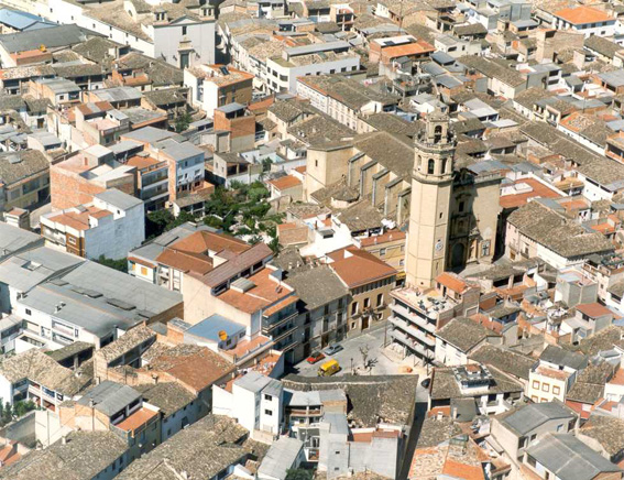 Iglesia de San Miguel Arcángel (Benigánim)